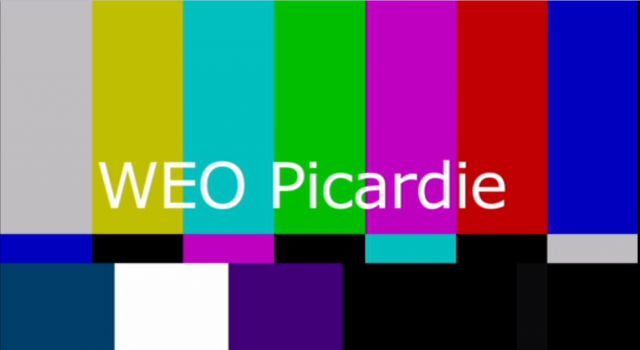 Mire Weo Picardie sur Eutelsat 5°Ouest